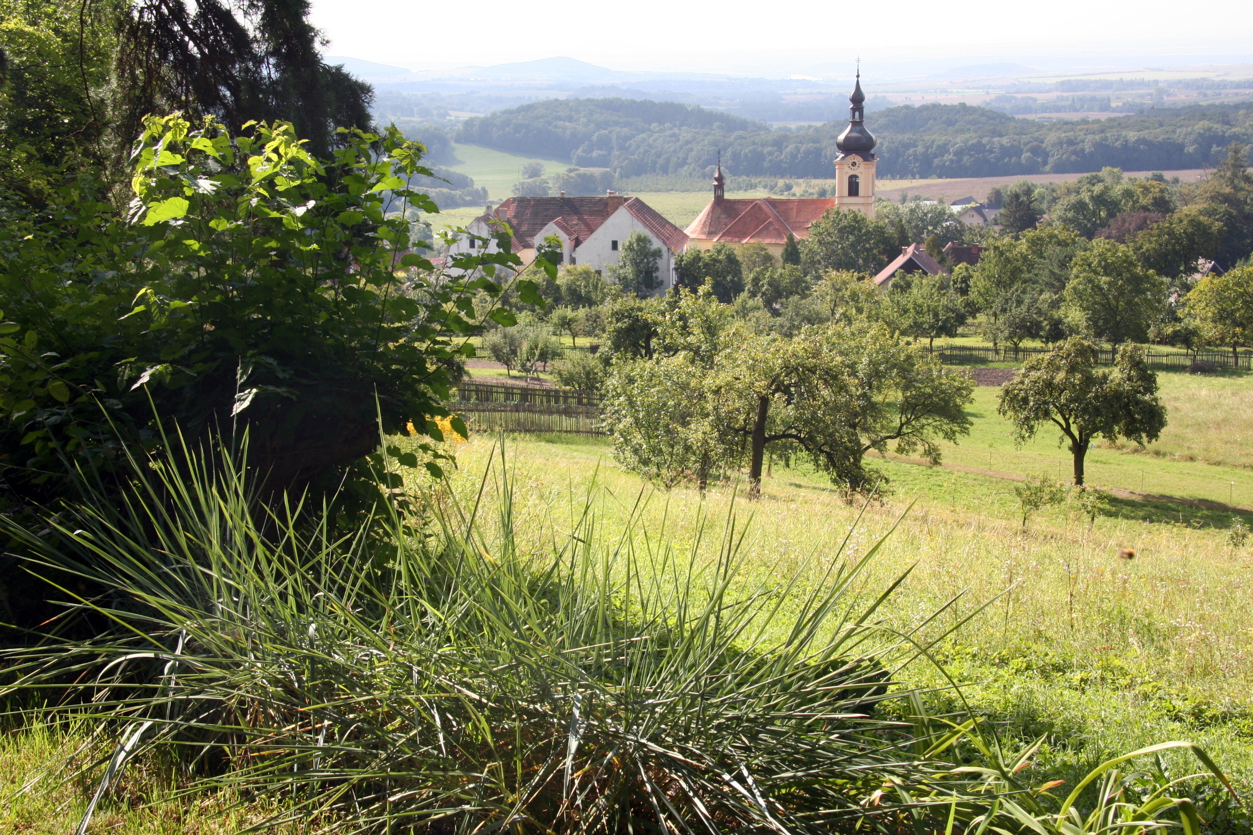 Třebušín, Ortsansicht